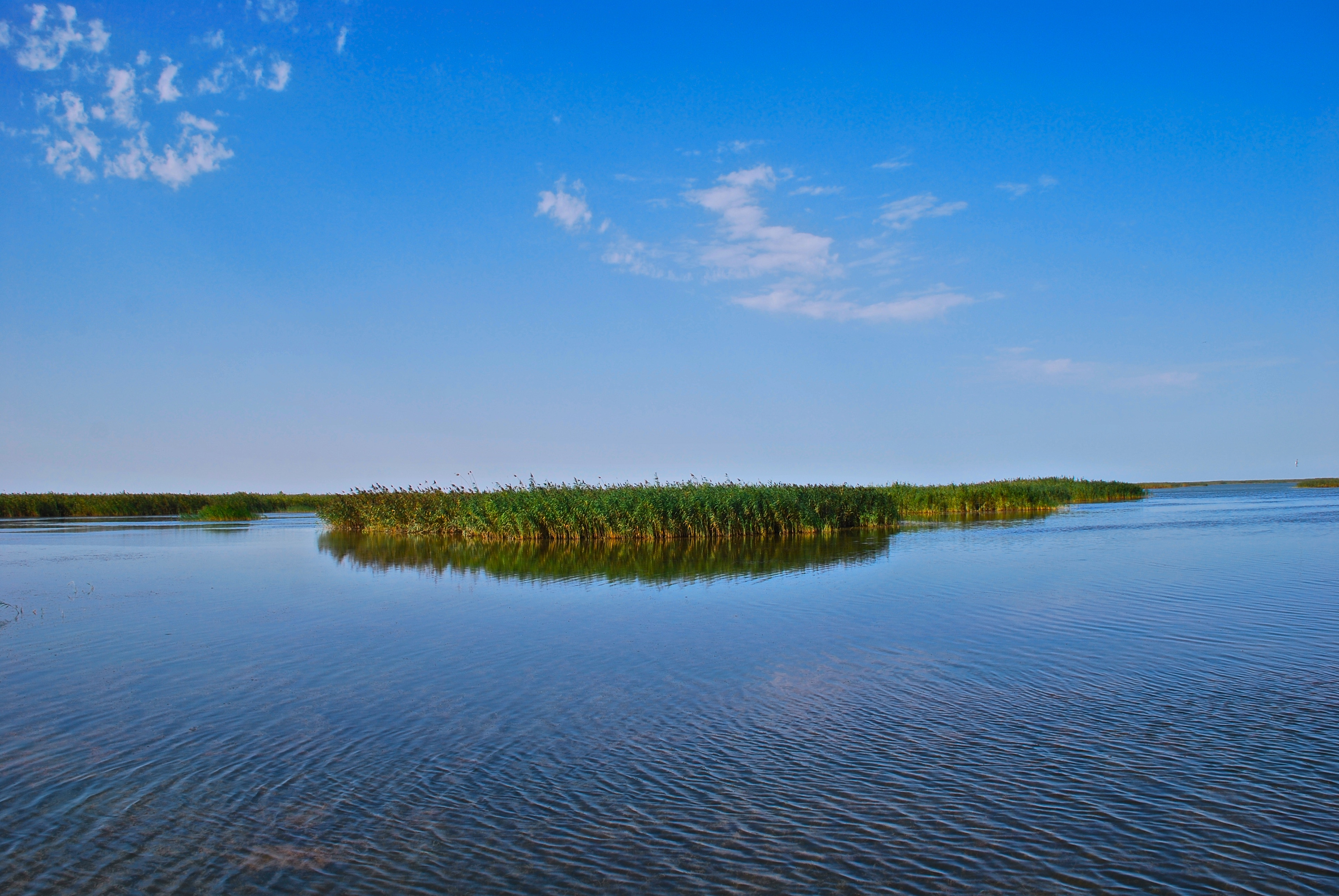 Hirkan National Park 1